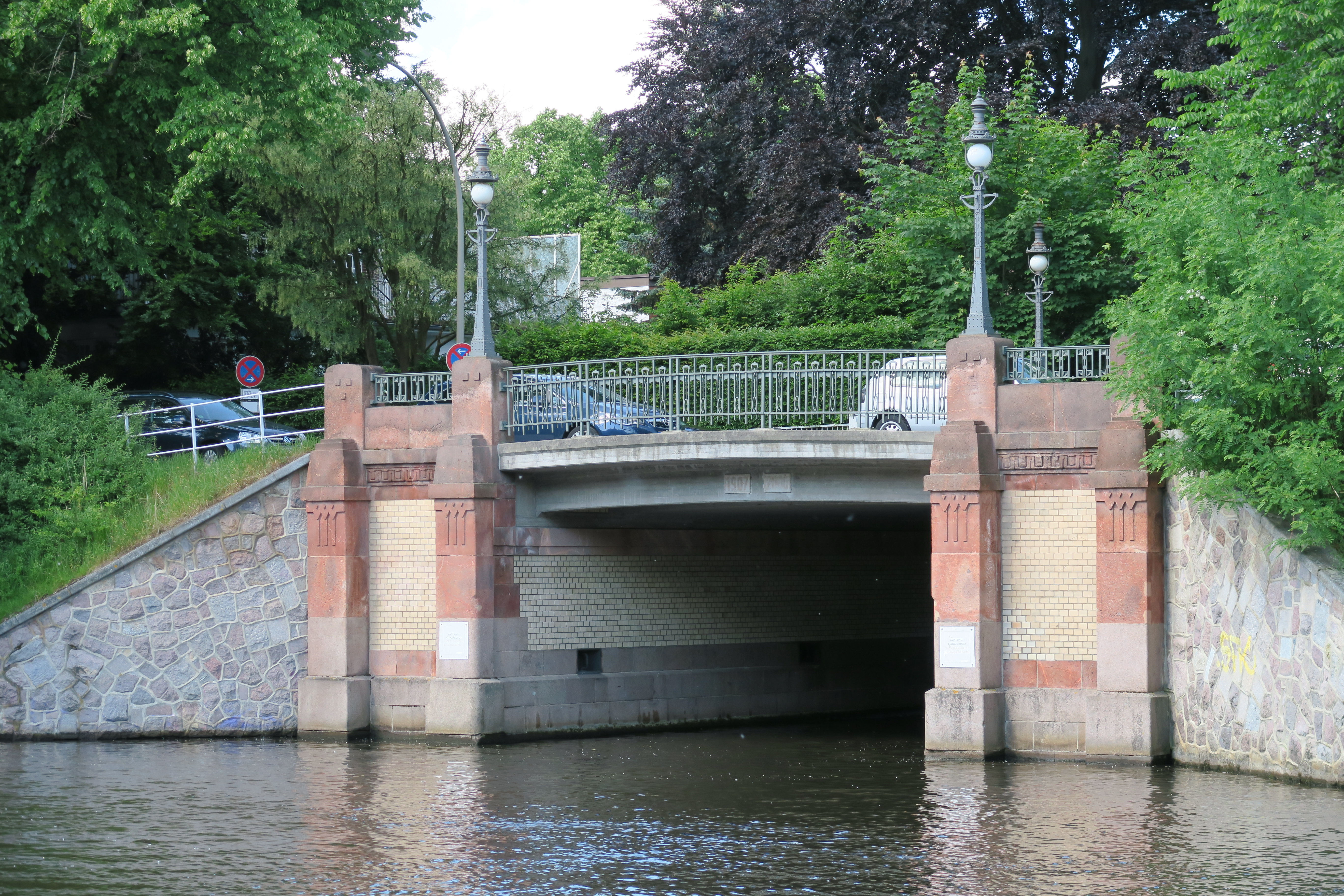 Leinpfadbrücke in Hamburg-Winterhude This is a photograph of an architectural monument.